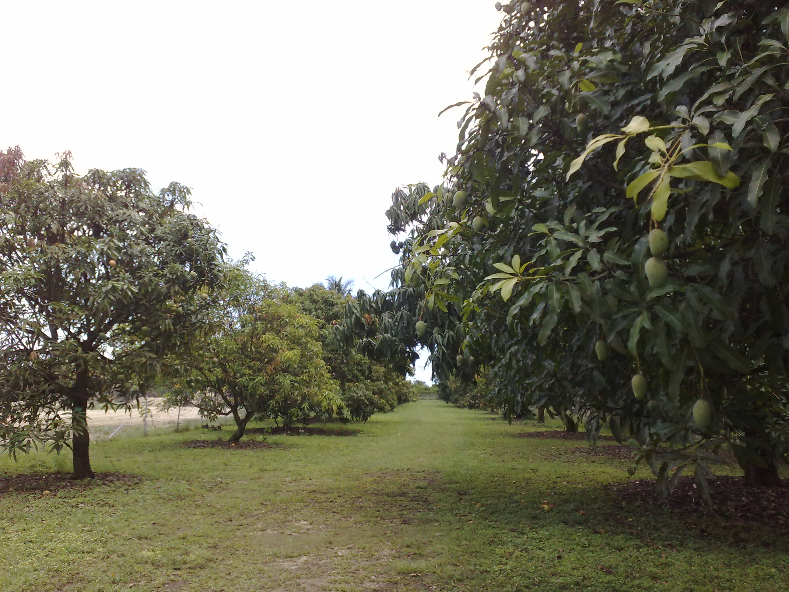 Fruit & Spice Park mango grove